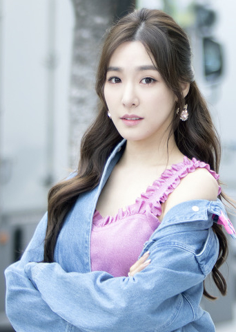 Tiffany Hwang el 28 de marzo de 2017.